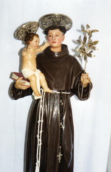 Statua del 600 di Sant'Antonio di Padova che si venera a cura delle confraternite del Centro storico nella chiesa di Sant'Agostino in Taranto